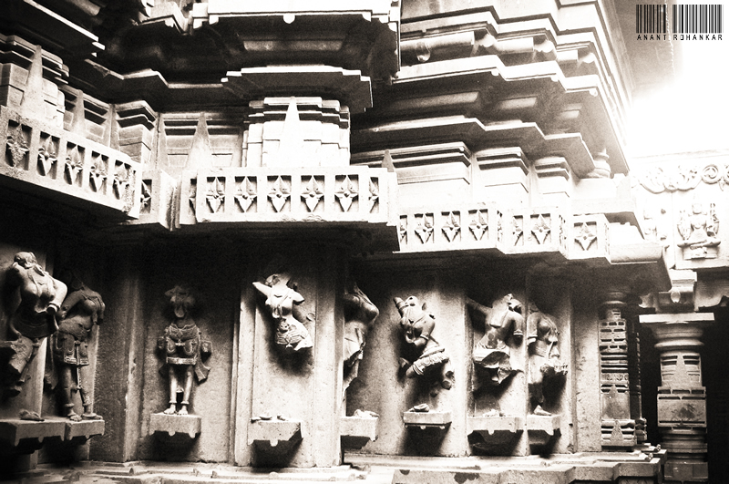 Bhuleshwar